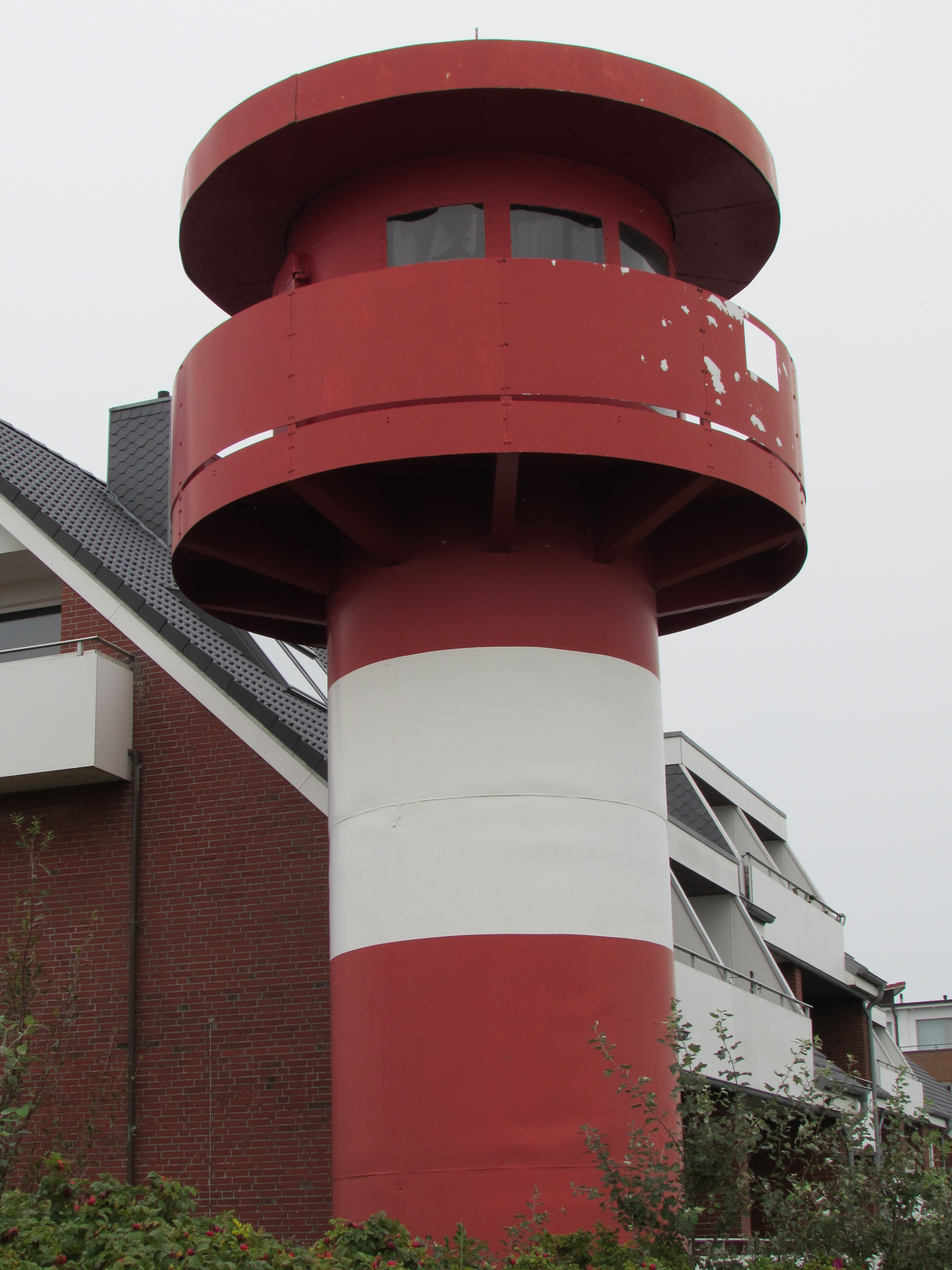 Quermarkenfeuer Wittdün